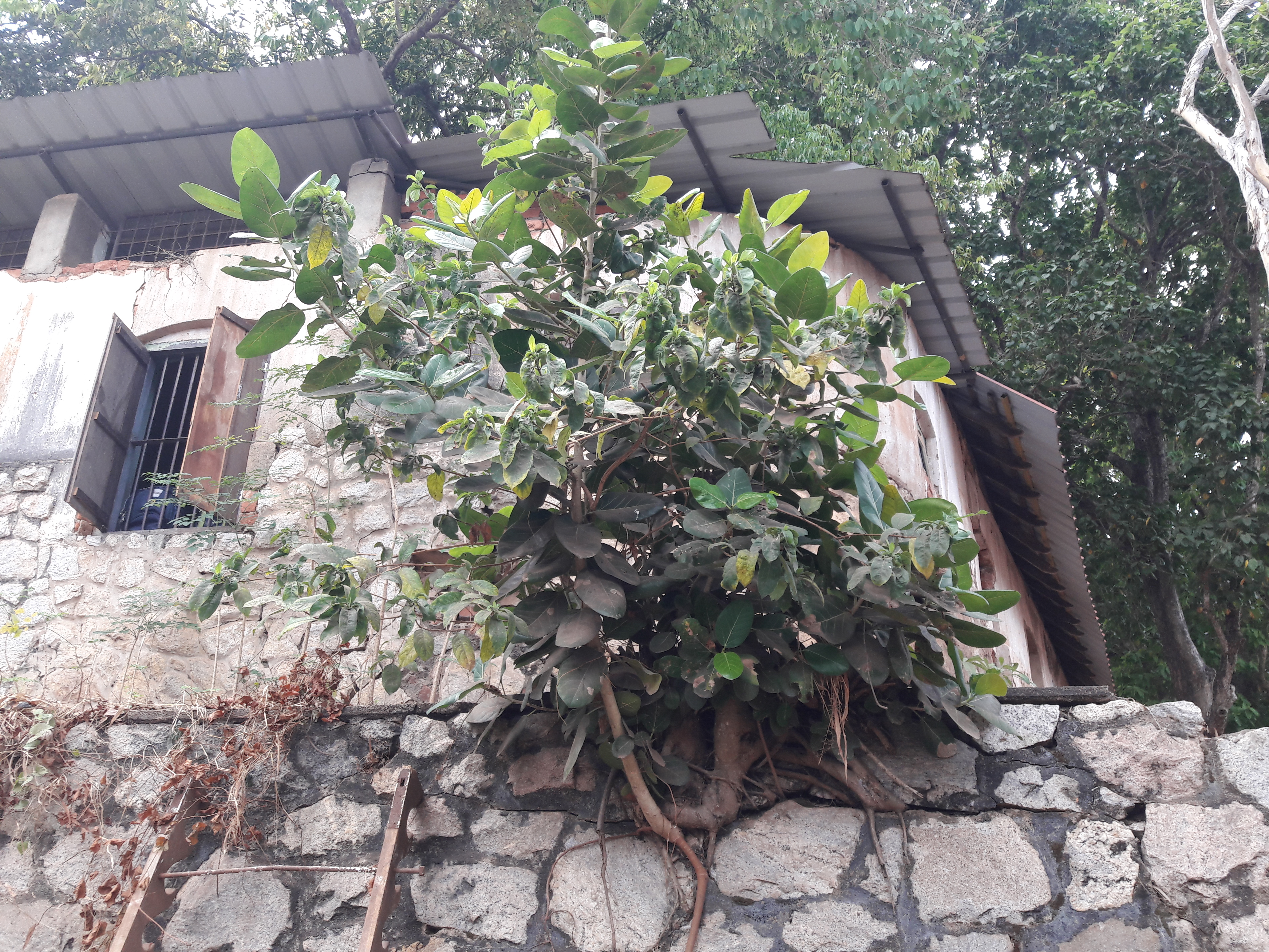 ഗവ. മോഡൽ ബോയ്സ് എച്ച്.എസ്.എസ്, തൈക്കാട് പ്രതികൂല സാഹചര്യങ്ങളില്‍ വളരുന്ന ഒരു പേരാല്‍ മരം Banyan tree ശാസ്ത്രീയ നാമം Ficus benghalensis കുടുംബം Moraceae.